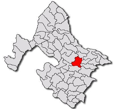 Categorie:Hărţi ale judeţului Mehedinţi